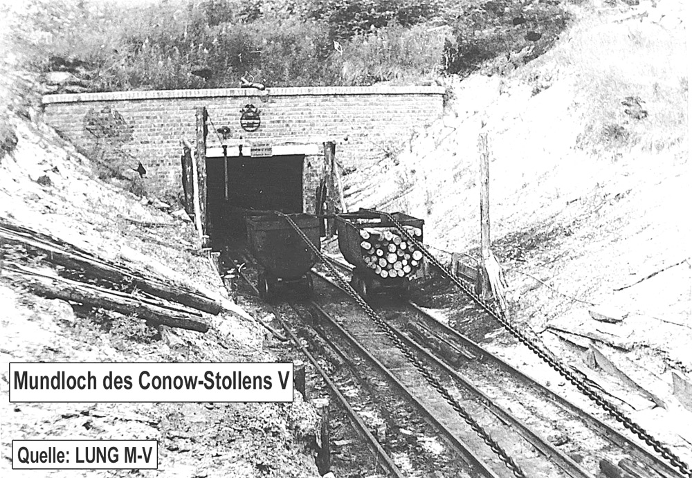 Mundloch des Conow-Stollens V